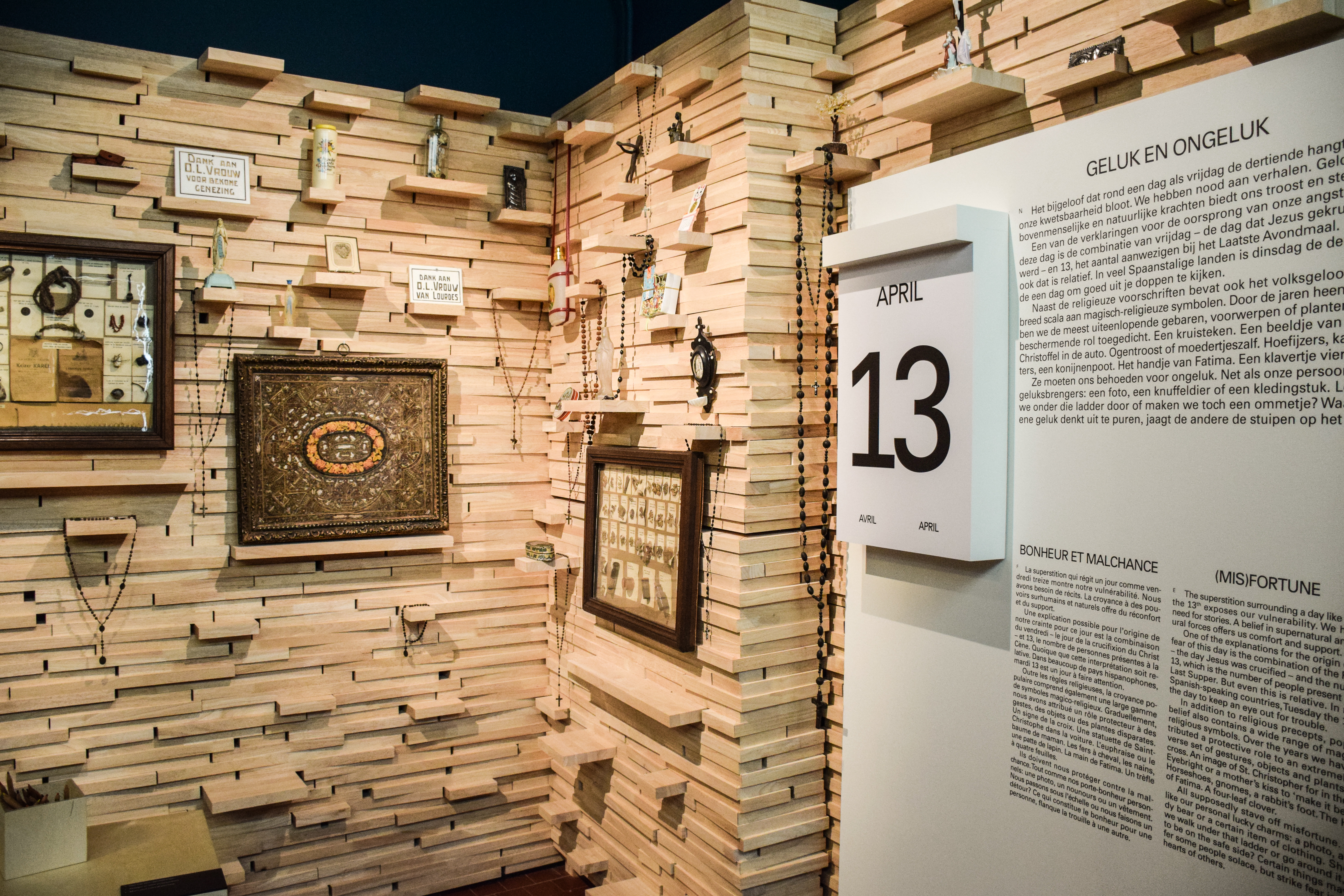 Huis van Alijn, gelukskamer